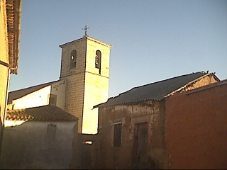 Foto realizada con la cámara personal desde la plaza de esta localidad salmantina. © (--Hari Seldon 01:35 19 abr, 2005 (CEST)).